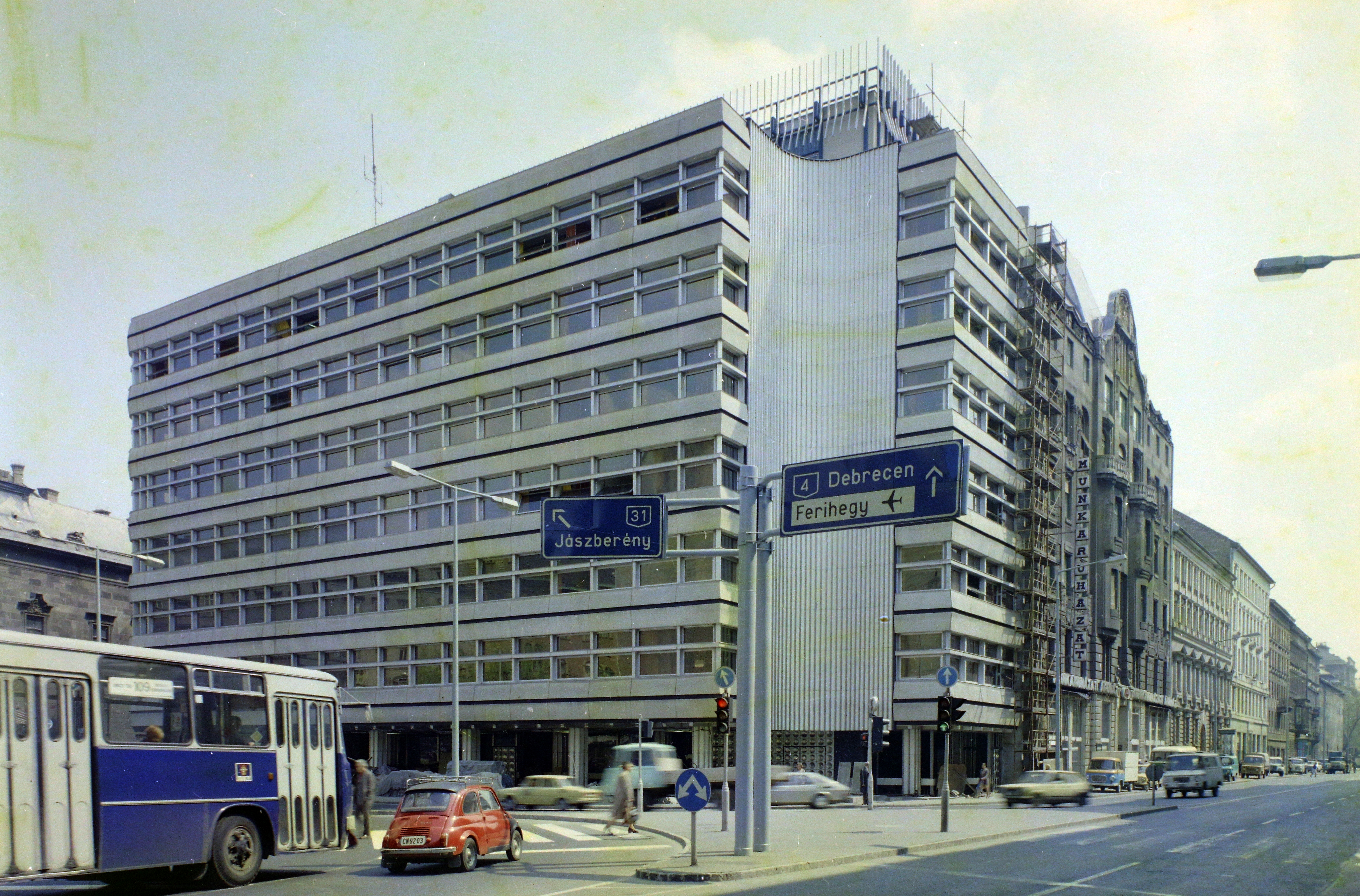 Üllői út, a BKV Forgalomirányító Központ, balra az építkezés során megnyitott névtelen utca a Baross utca felé. Location: Hungary, Budapest VIII. Tags: colorful, Ikarus-brand, Budapest Title: Üllői út, a BKV Forgalomirányító Központ, balra az építkezés során megnyitott névtelen utca a Baross utca felé.